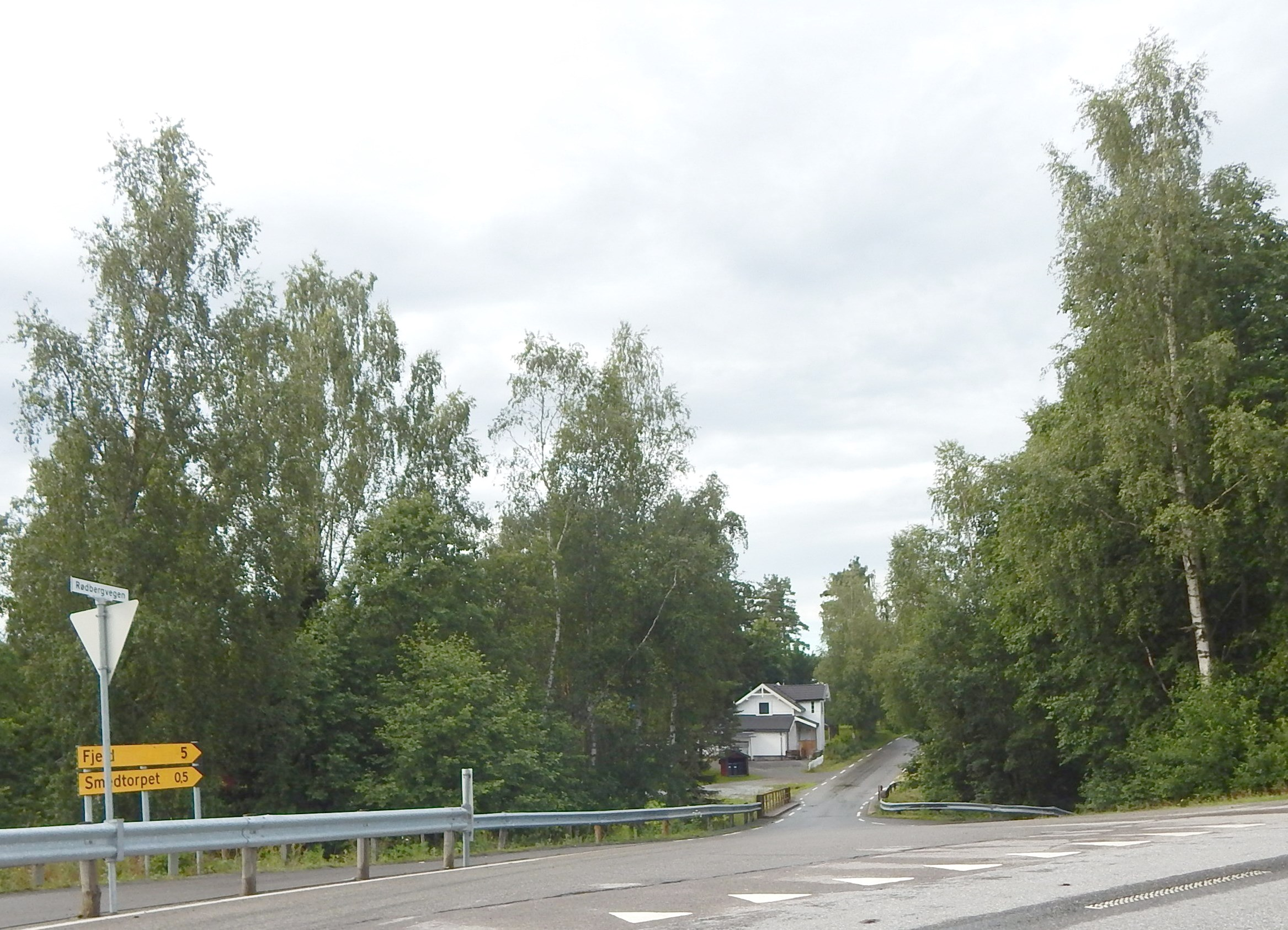 Rødbergvegen (fylkesvei 1970, tidl. 330) sett fra fylkesvei 21